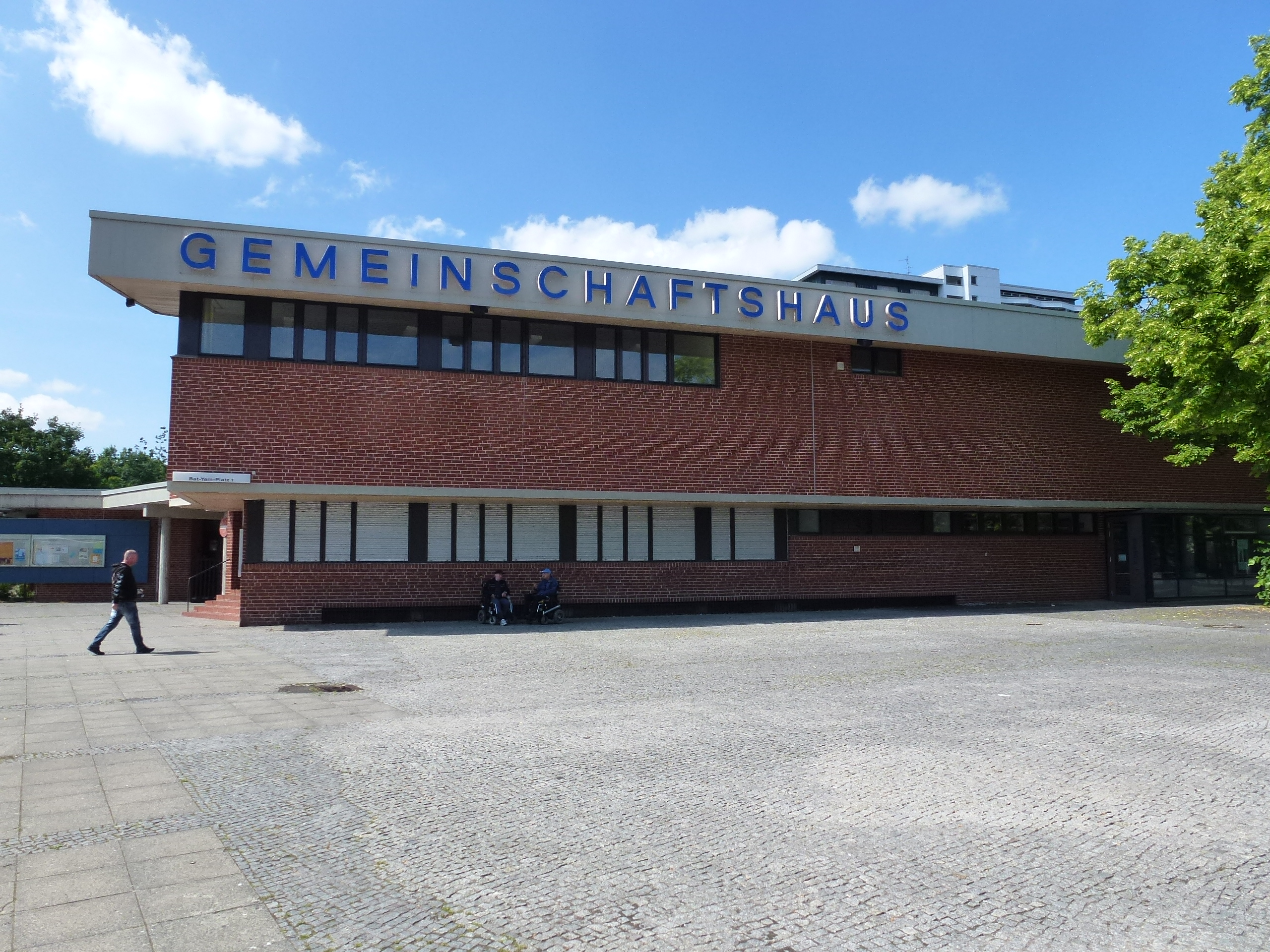 Berlin-Gropiusstadt Lipschitzplatz